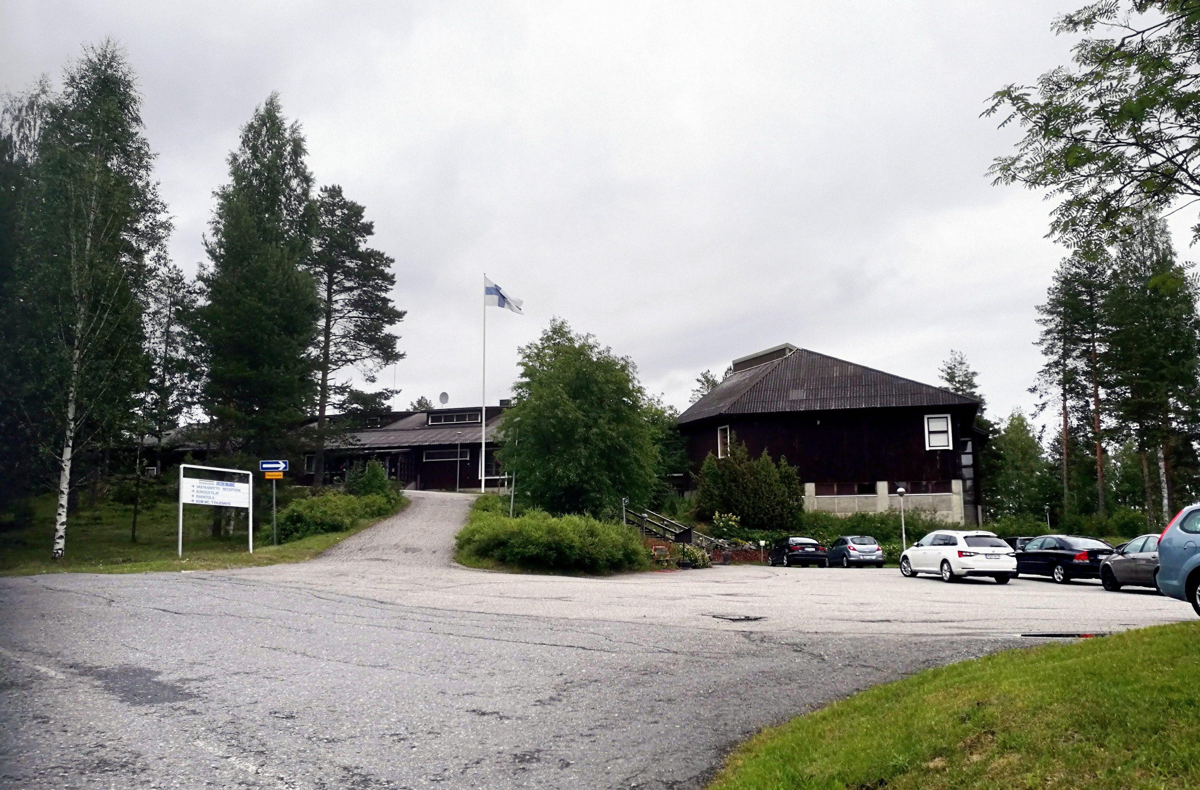 Lomakeskus Huhmarin päärakennus 30.6.2018